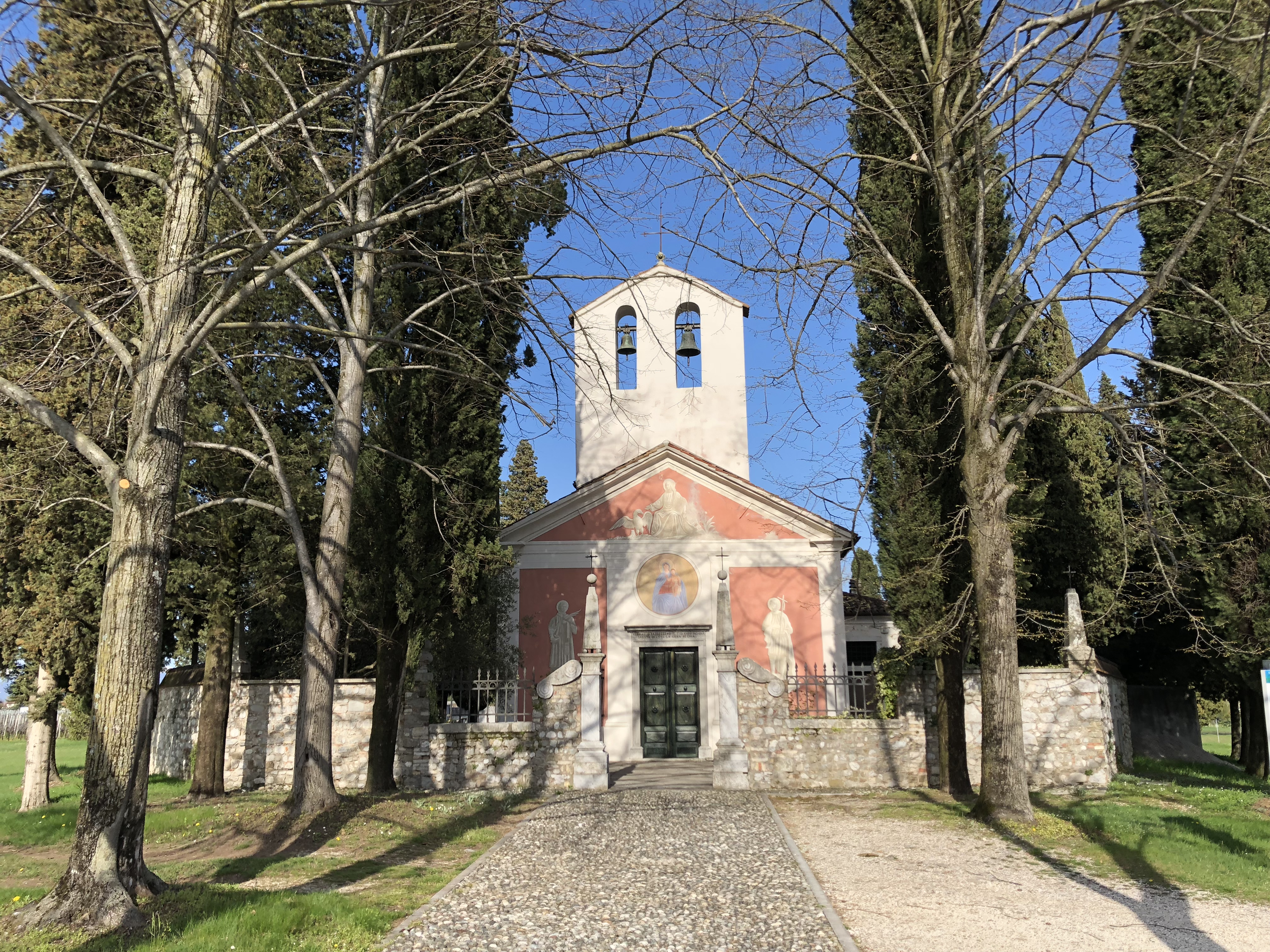 Viscone Chiesa Cimitero